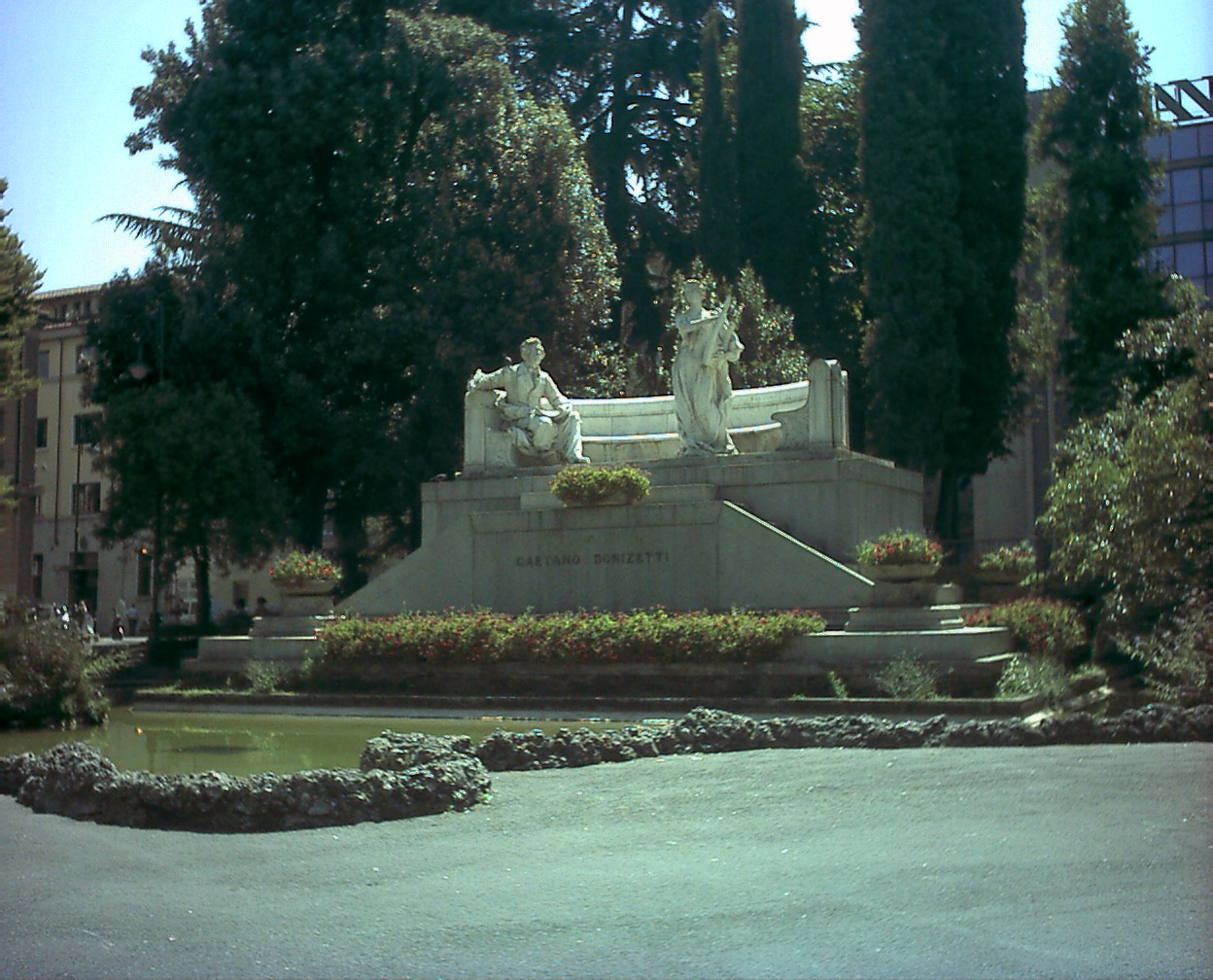 Fontana Gaetano Donizetti, Bergamo, Italy